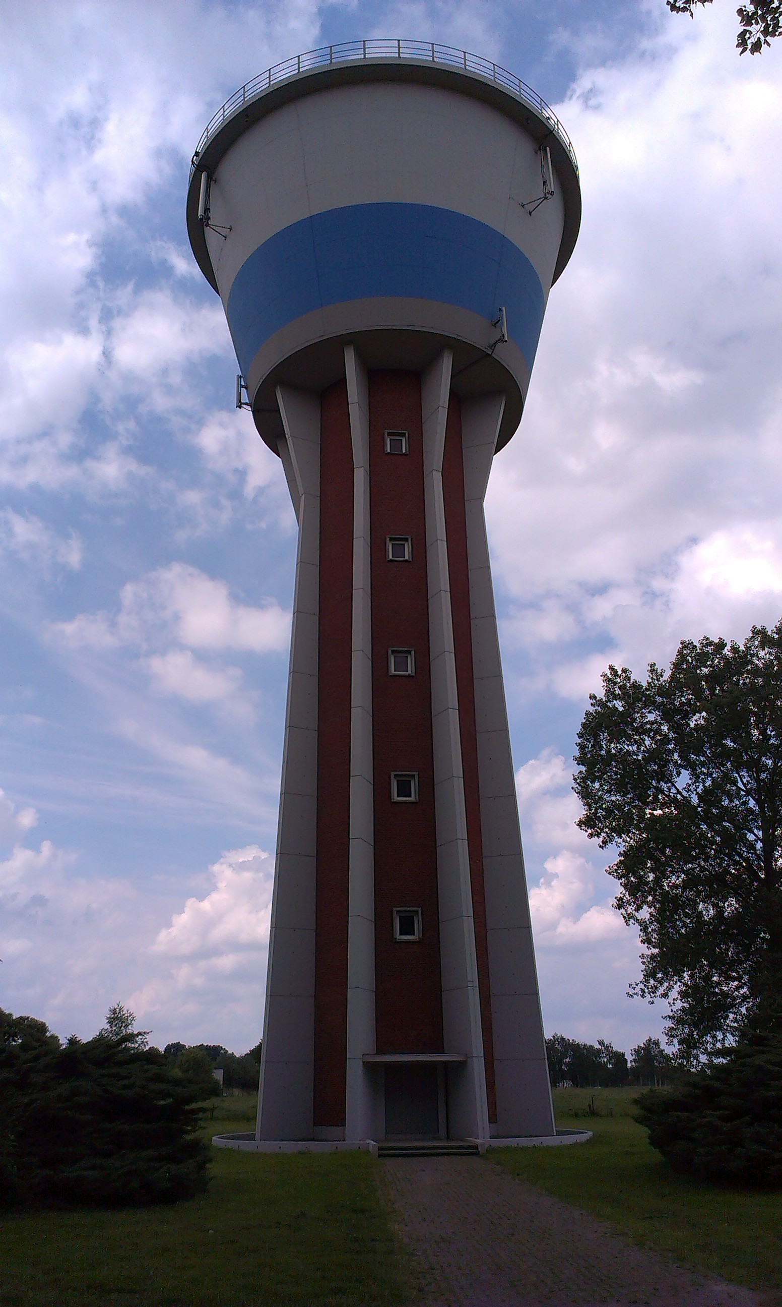 watertoren Meer